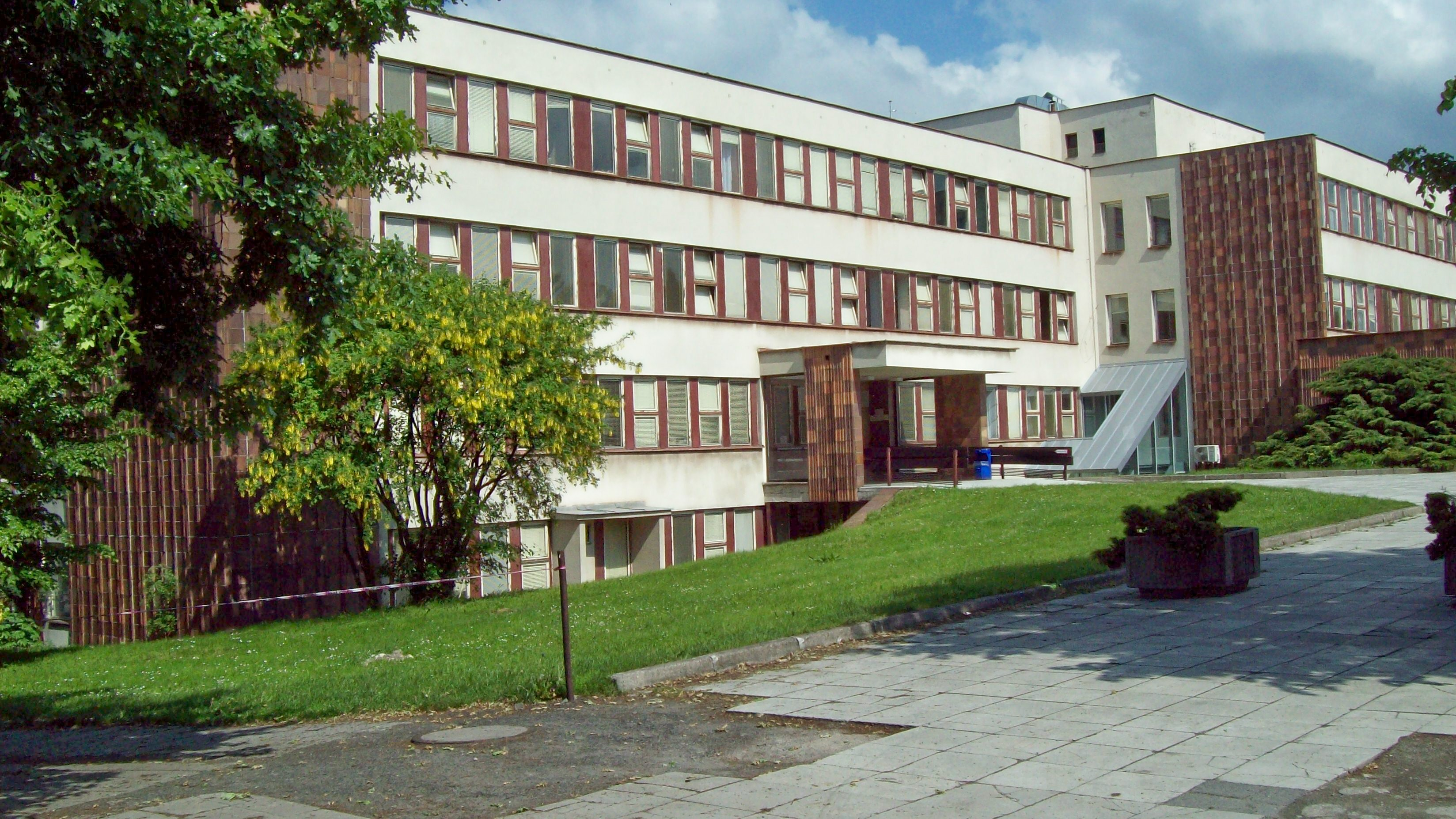 Poliklinika, součást Nemocnice s poliklinikou Mělník. Ve vchodu je umístěn BabyBox.